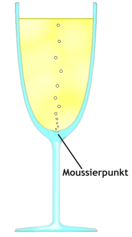 Grafische Darstellung eines Sektglases mit Moussierpunkt